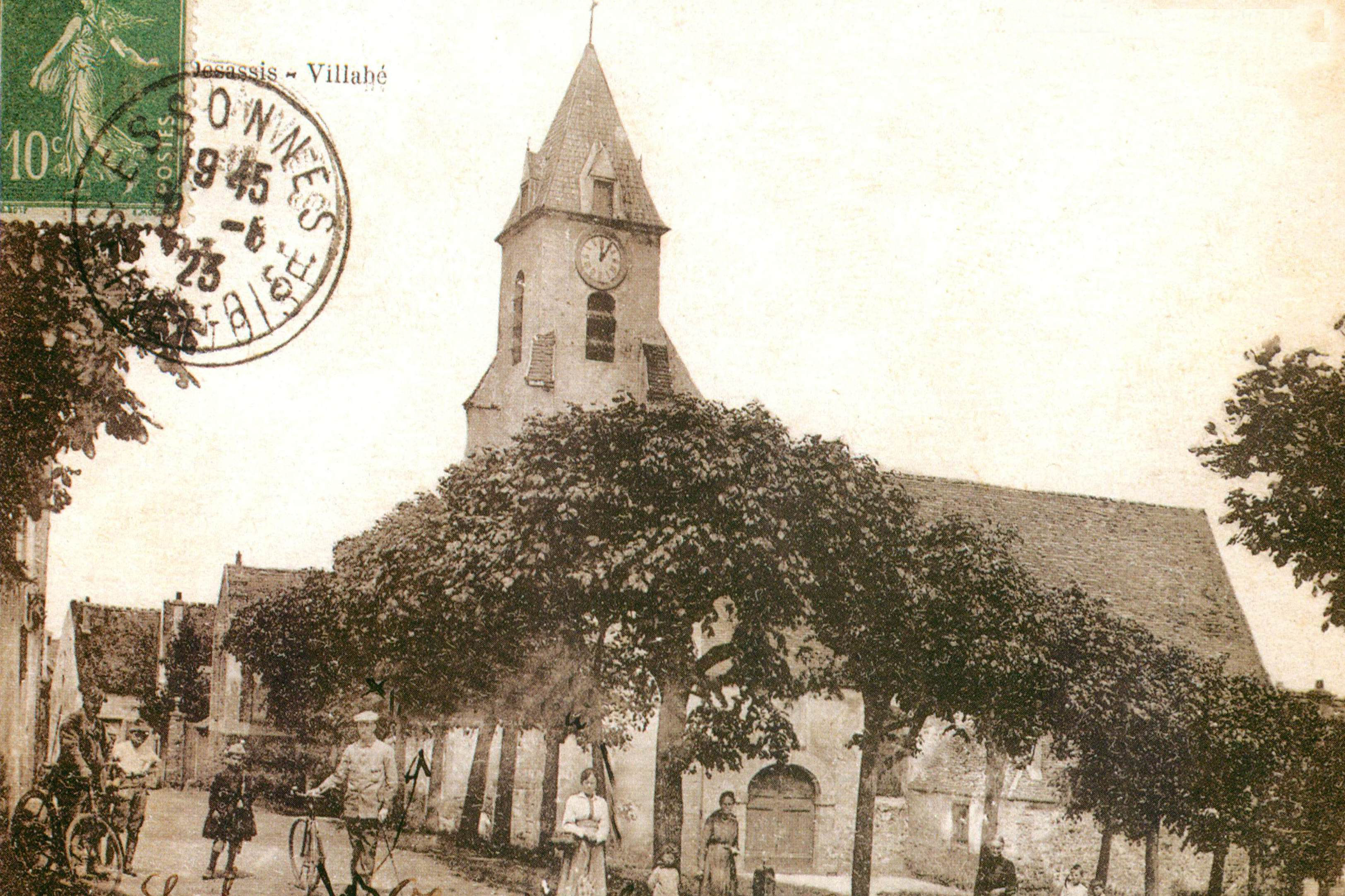 Église de Villabé / Villabé / Essonne / France